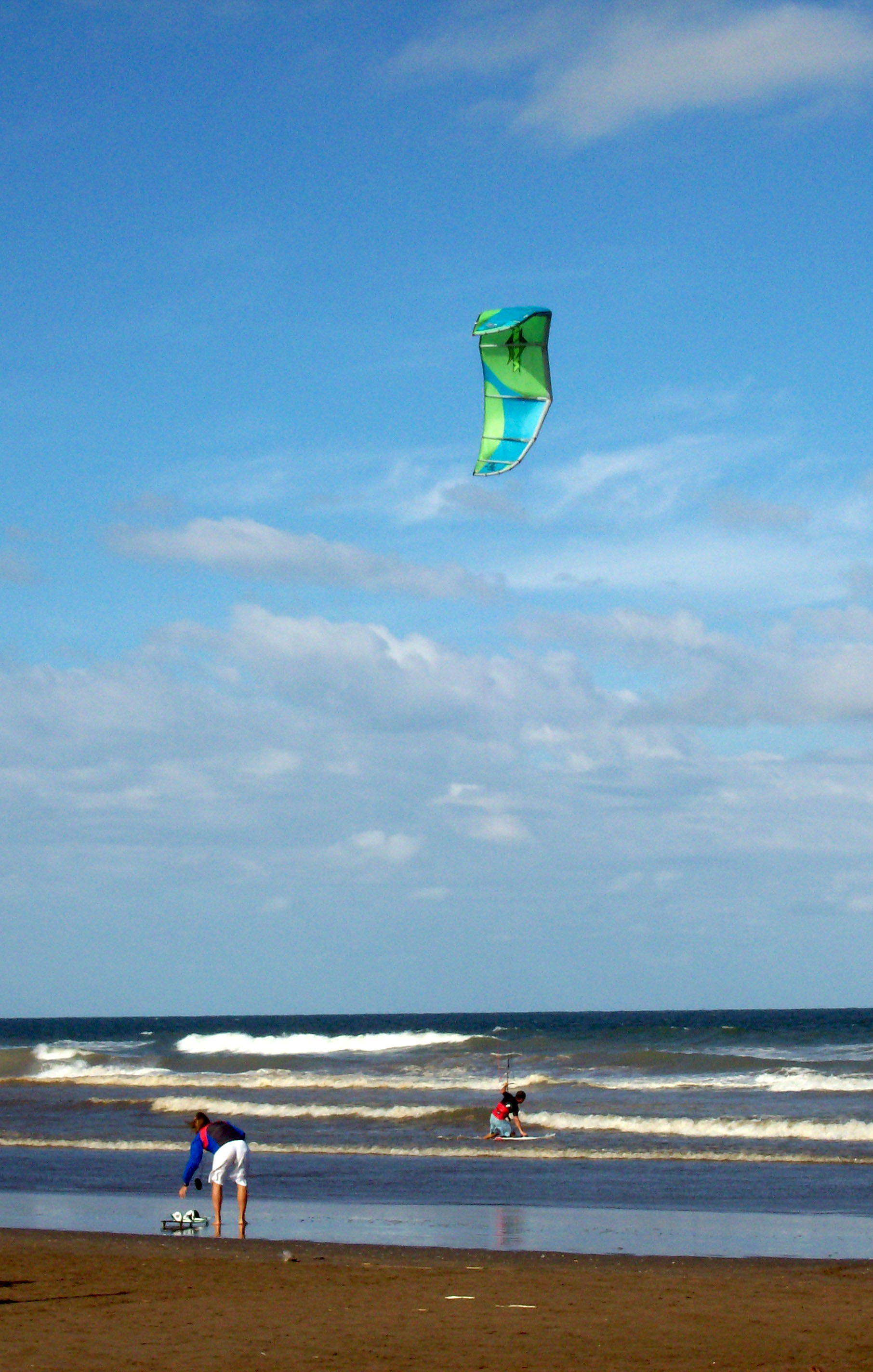 A kitesurfer in Mar de Ajó, Buenos Aires province, Argentina